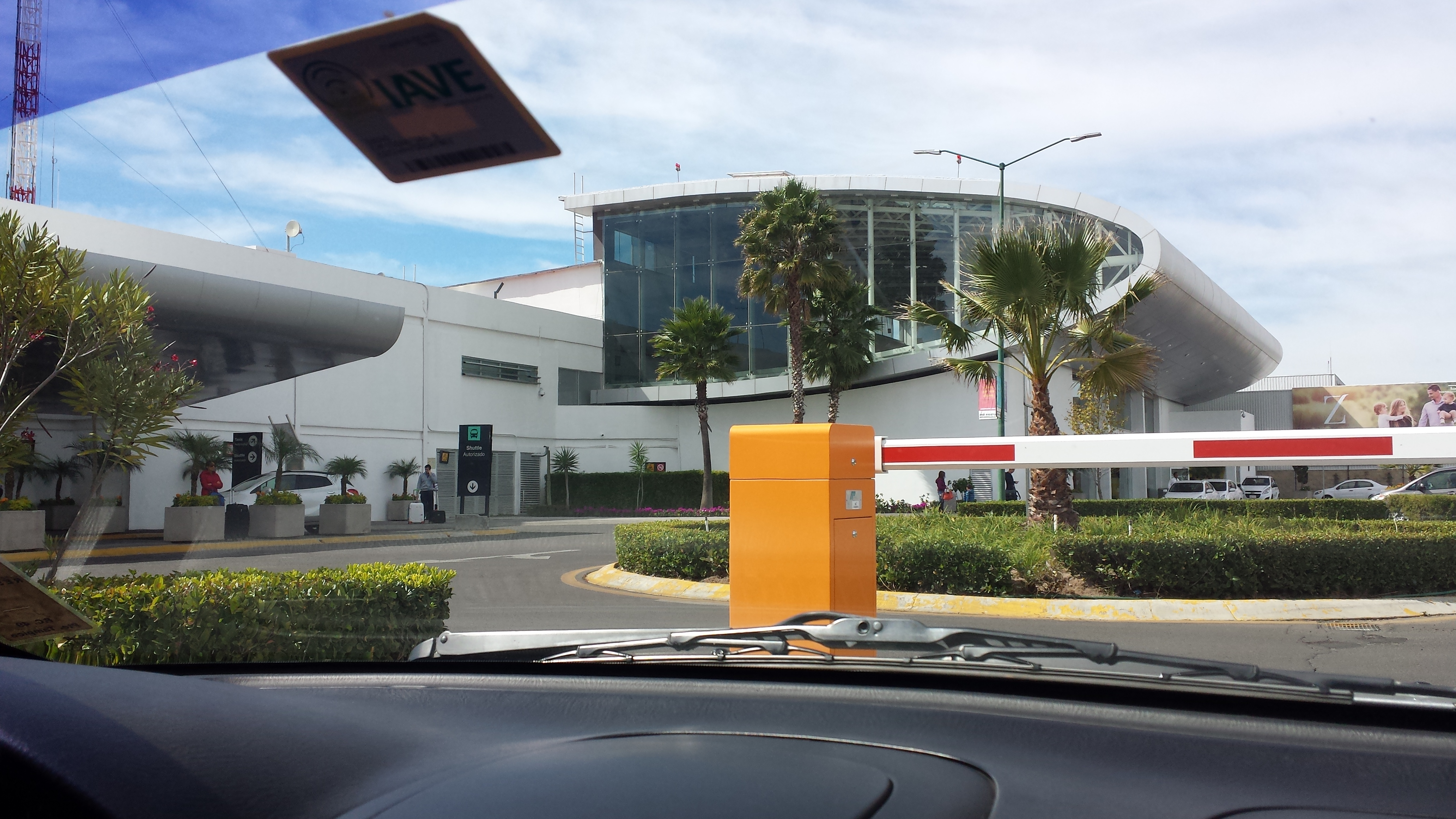 Fotografía de la fachada de la Terminal de Pasajeros del Aeropuerto Intercontinental de Querétaro